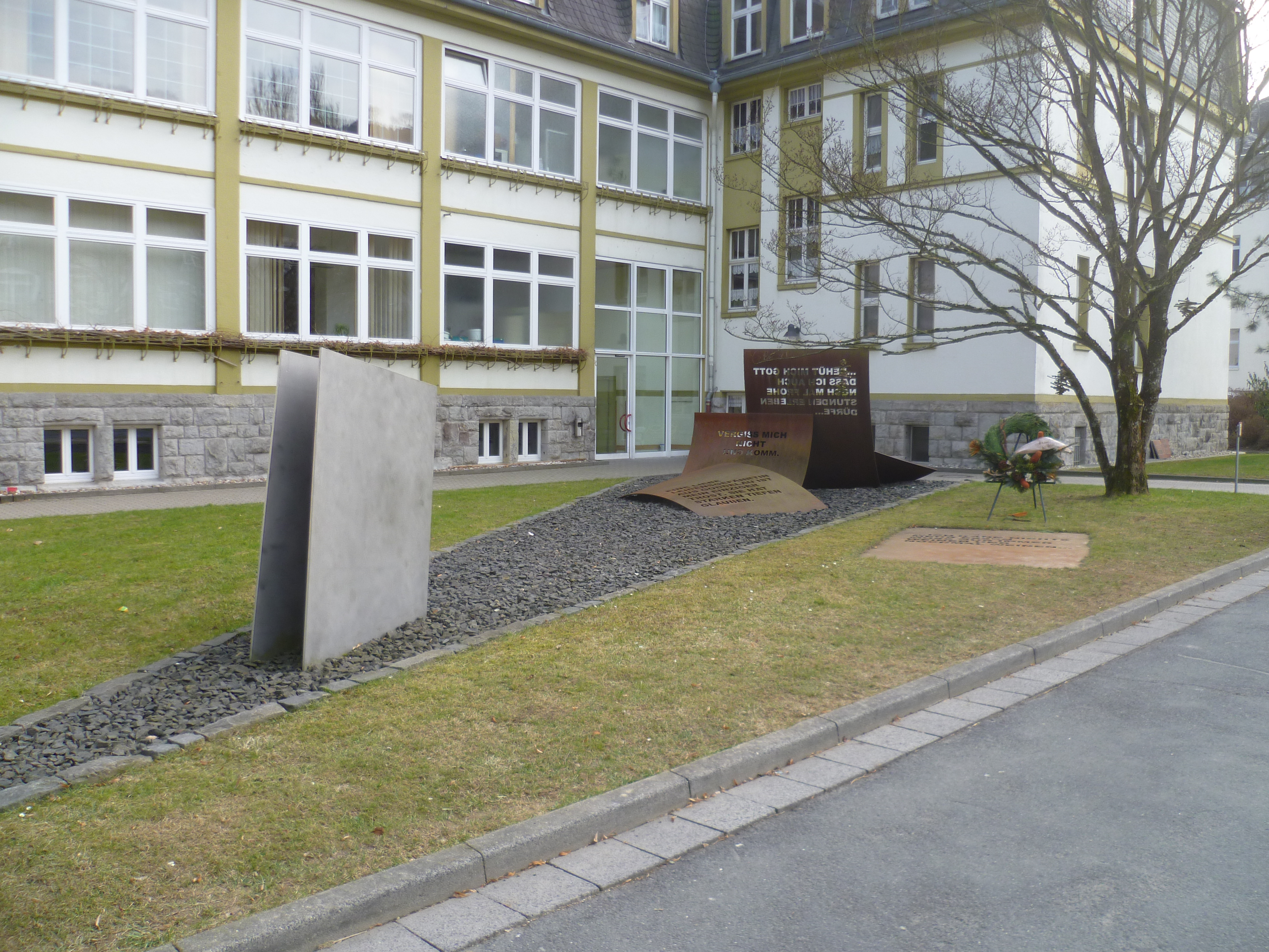 Die Gedenkstätte zu den Euthanasieopfern an den Heimen Scheuern